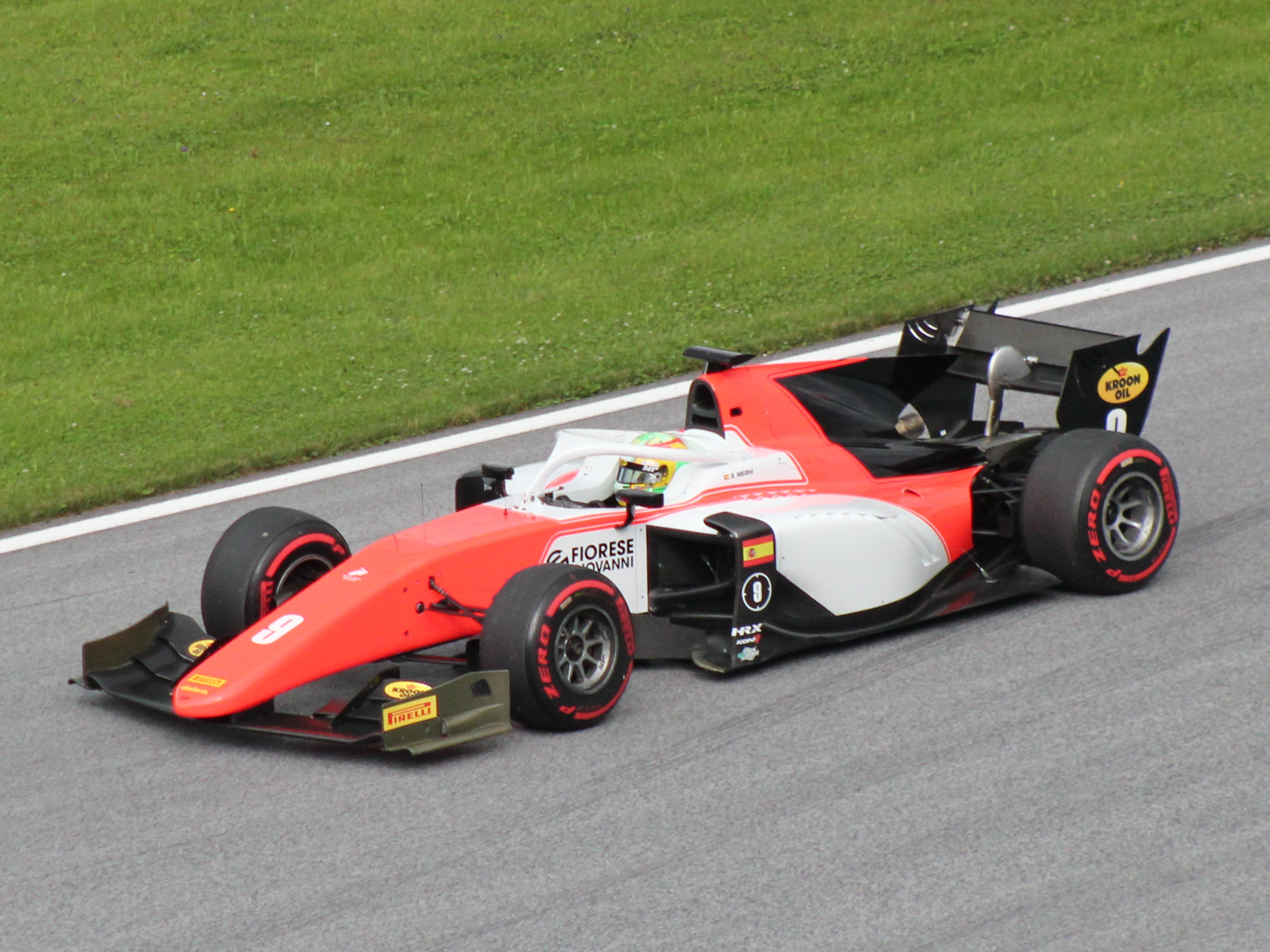 09 Roberto Merhi beim Rennwochenende in Österreich 2018 (1)